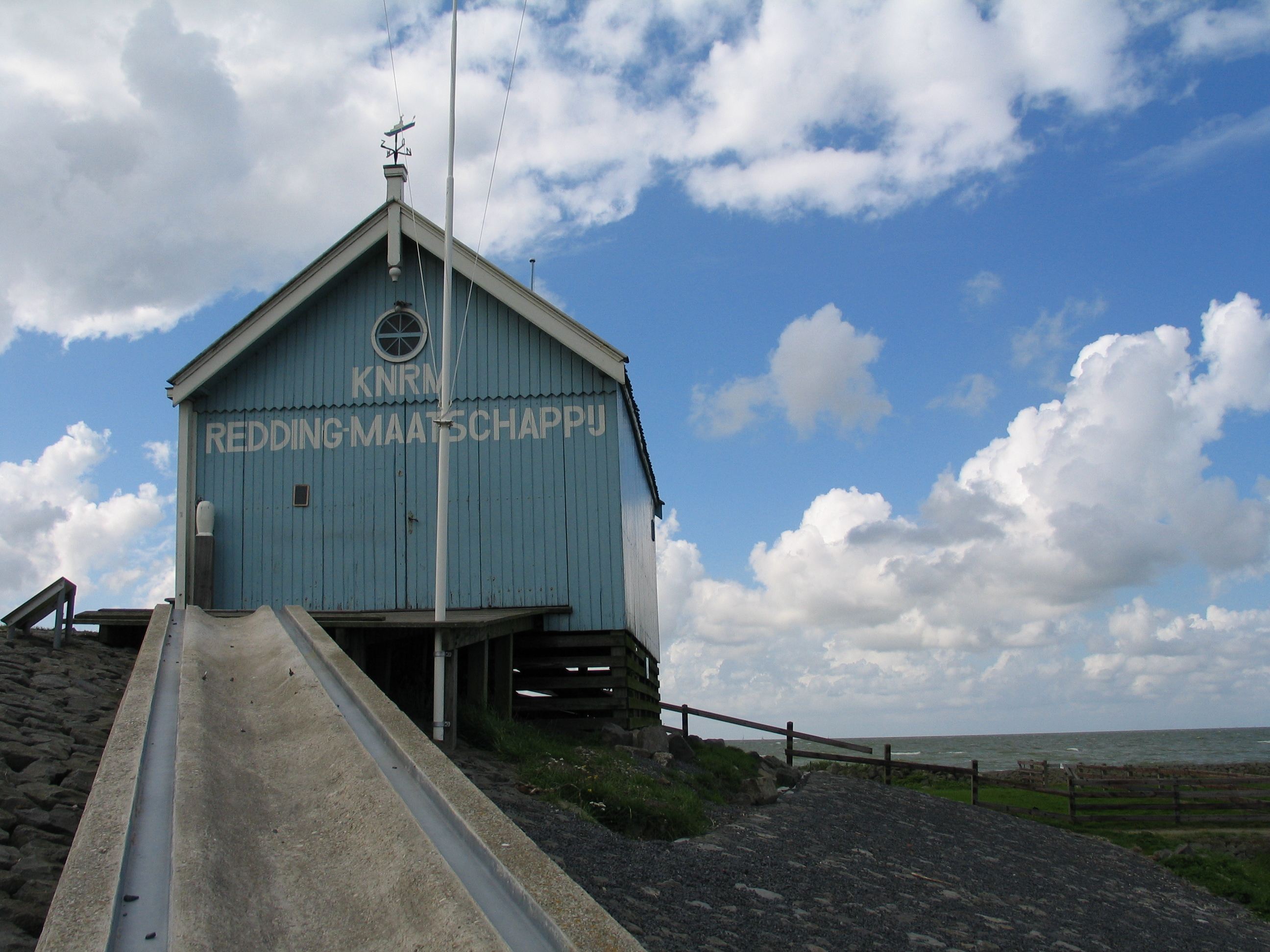 KNMR gebouwtje in Hindeloopen